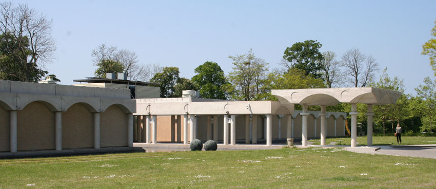 Euroc Malmö